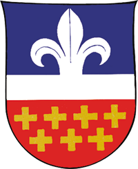 Wappen der Gemeinde Adlwang in Oberösterreich.